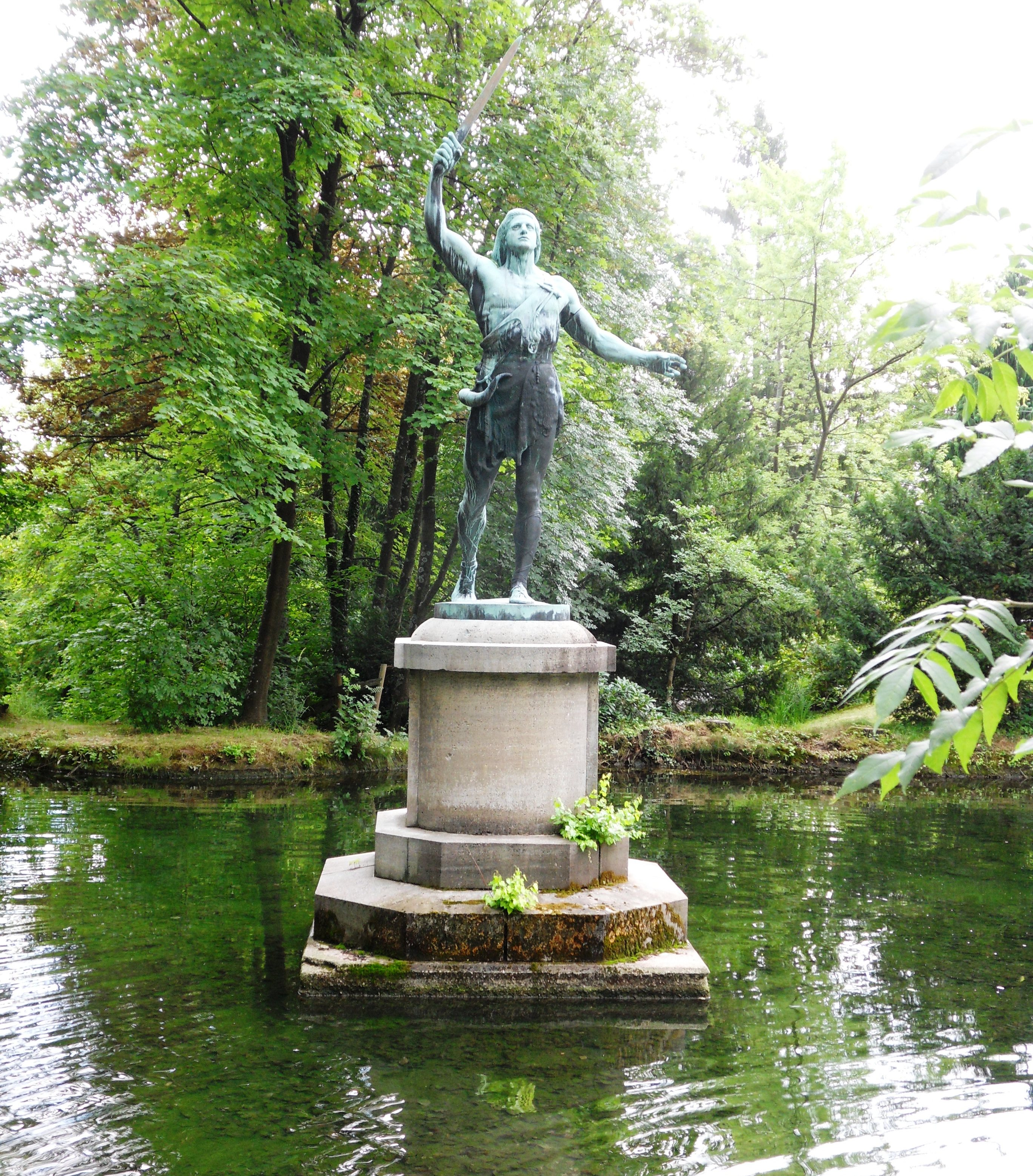 Inmitten des oberen Schlossweihers von Hohenbuchau in Georgenborn steht ein Steinsockel mit der überlebensgroßen Bronzefigur eines Jünglings (Siegfried) in Fellbekleidung mit umgehängtem Horn und erhobenem Schwert